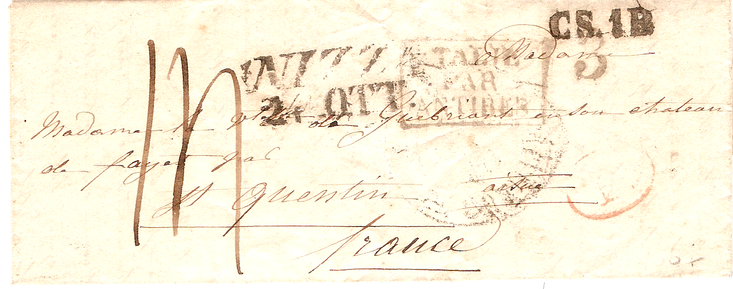 Lettre Nice date entre 1834 et 1839 (la date n'est pas donnée dans la lettre le cachet d'entrée est antérieur à 1839 et probablement postérieur à 1834), avec marque d'entrée Italie vers France par Antibes